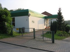 Clubheim des TSC